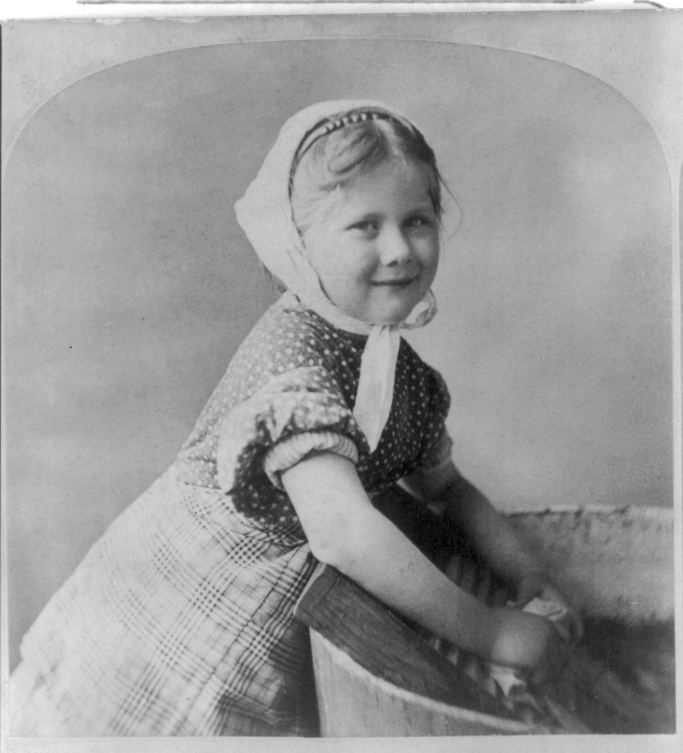 Small girl doing laundry.